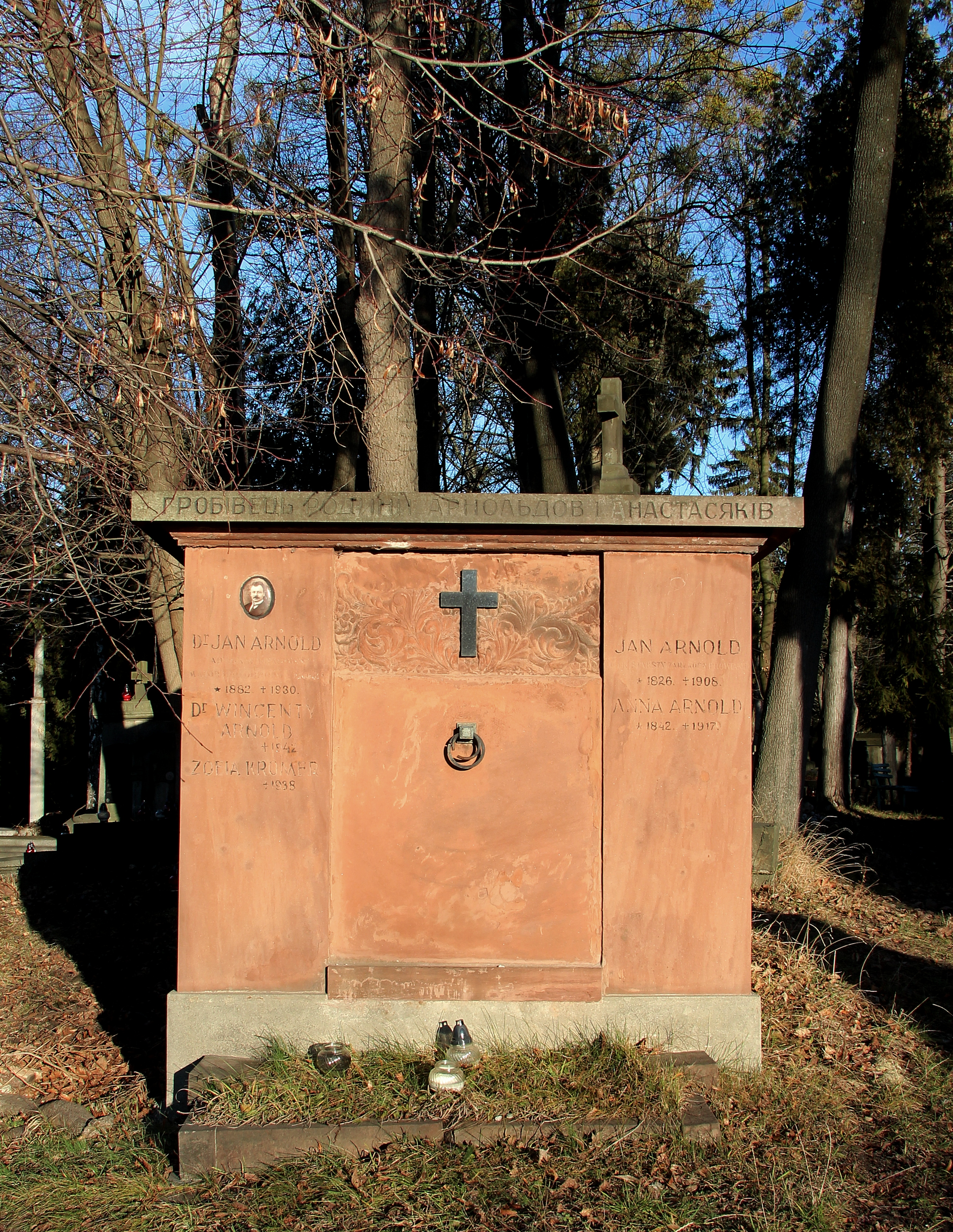 Гробівець родини Арнольдов і Настасяків.Личаківський цвинтар ,поле № 70.